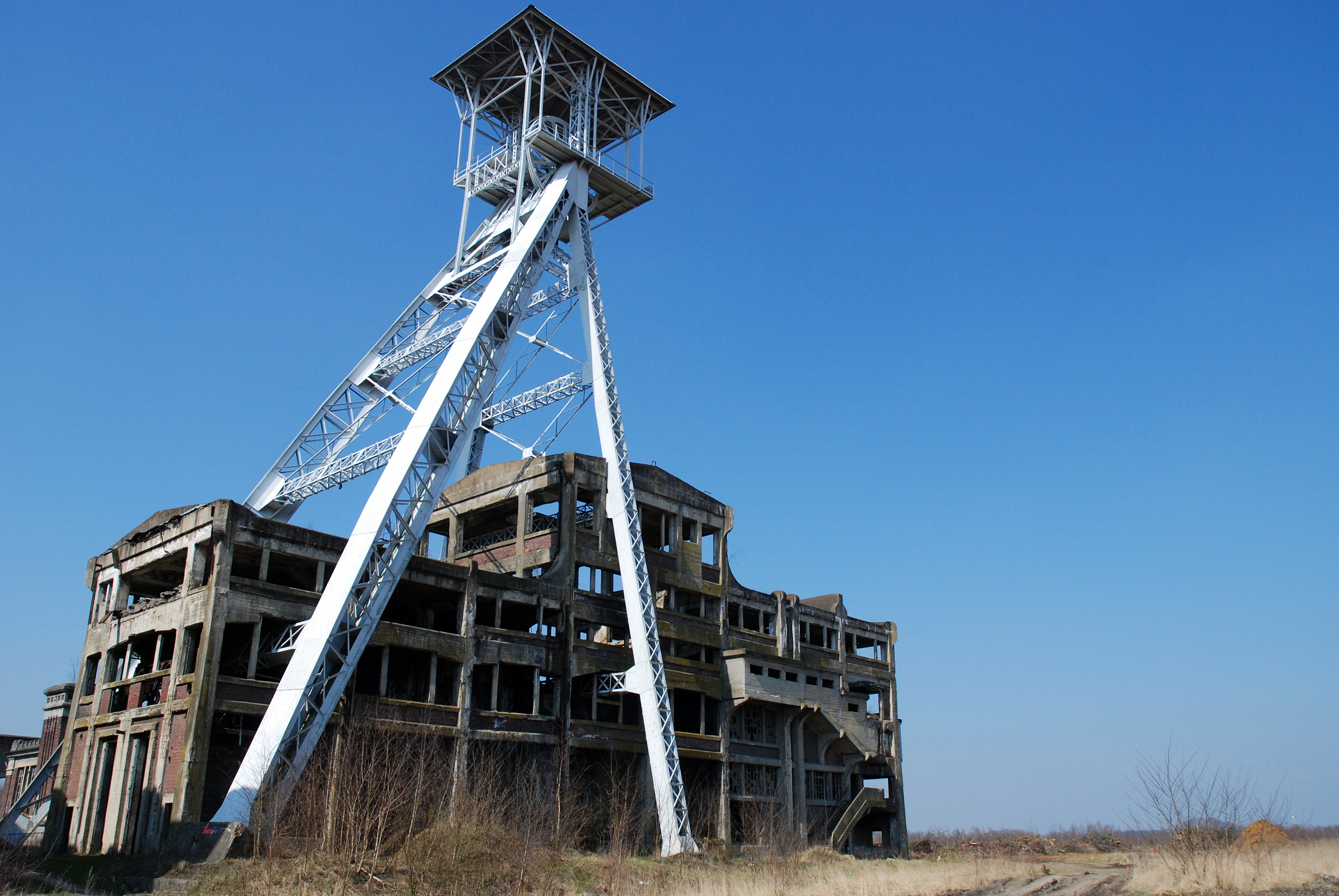 De schachtbok van de steenkoolmijn van Waterschei, België